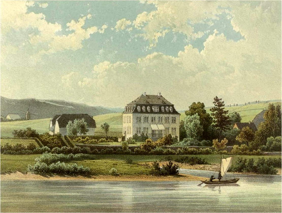 Schloss Würgassen, Lithografie aus dem 19. Jahrhundert